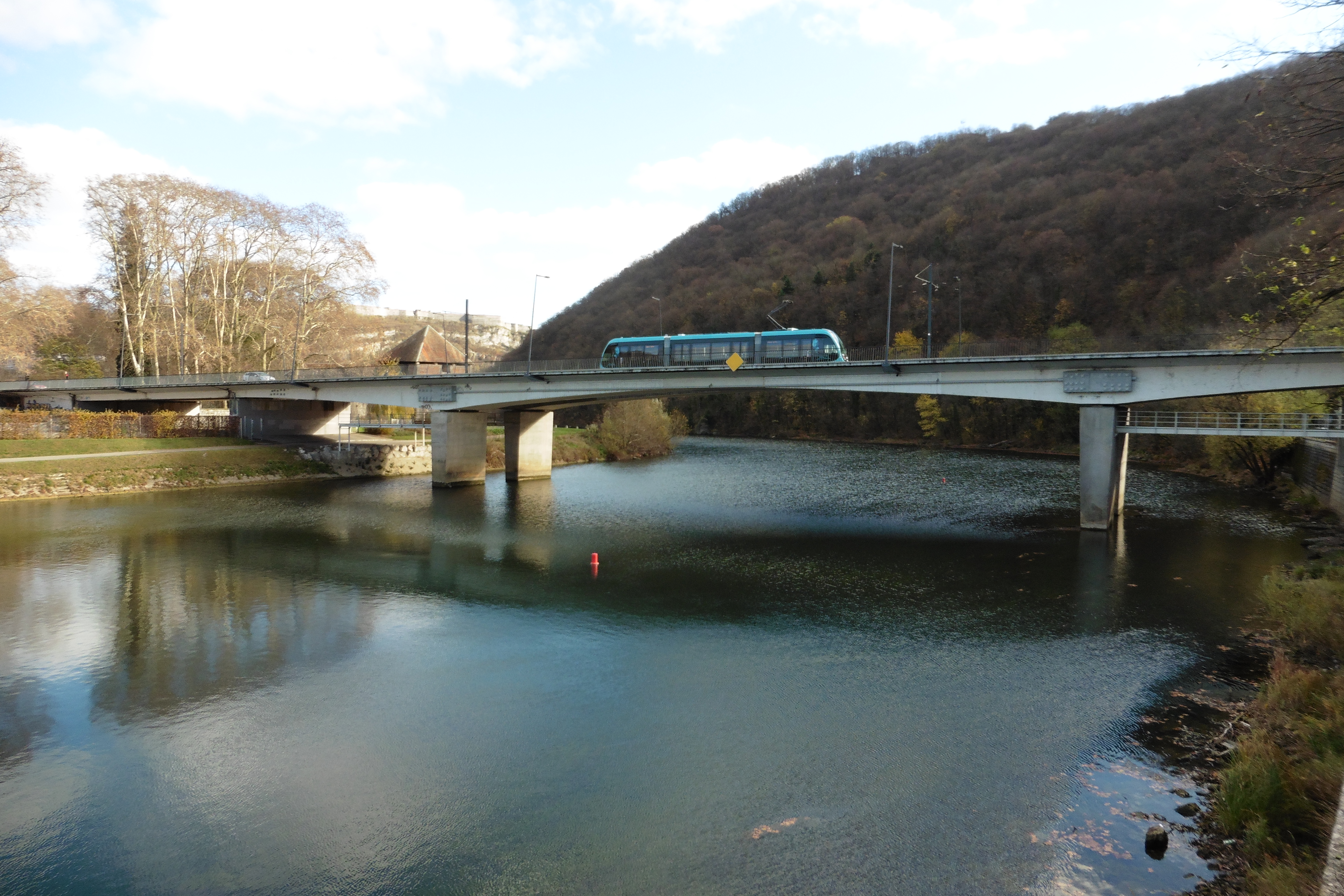 Ponts